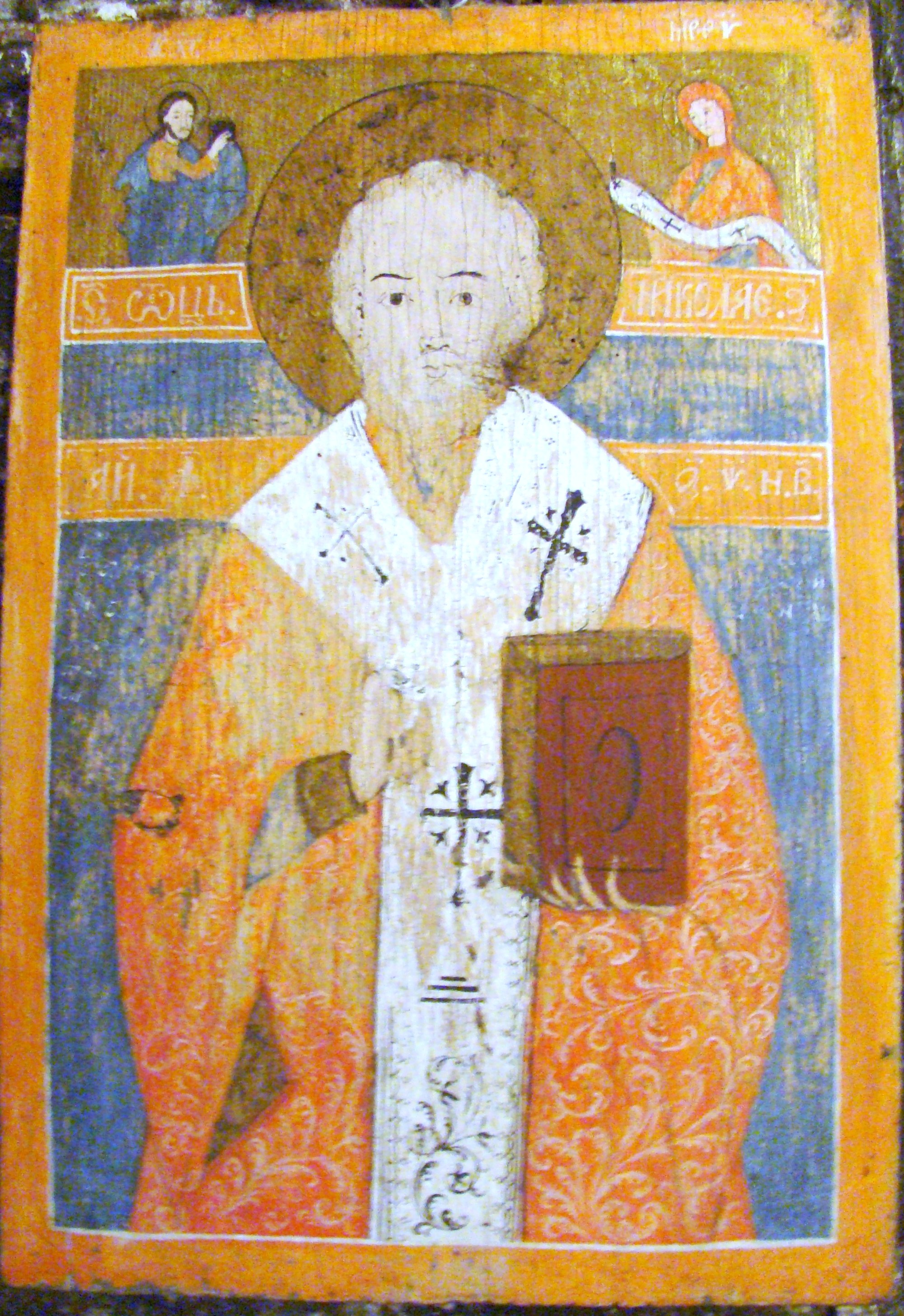 Biserica de lemn "Sfinții Arhangheli Mihail şi Gavriil" din Pădureni, județul Cluj